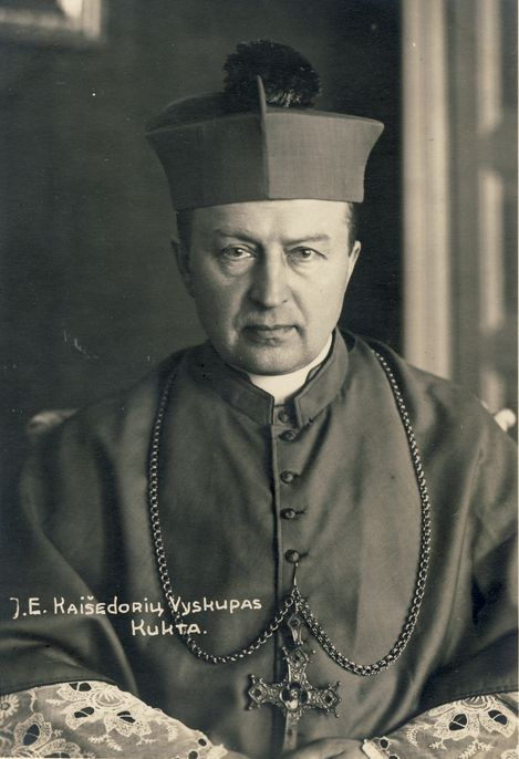 Juozapas Kukta (1873 m. lapkričio 3 d. Trakiniuose (dab. Anykščių raj.) – 1942 m. birželio 16 d. Kaune) – vyskupas, visuomenininkas, lietuvybės puoselėtojas.